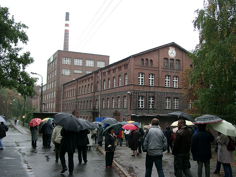 Stammwerk der Firme GREIFF Mode